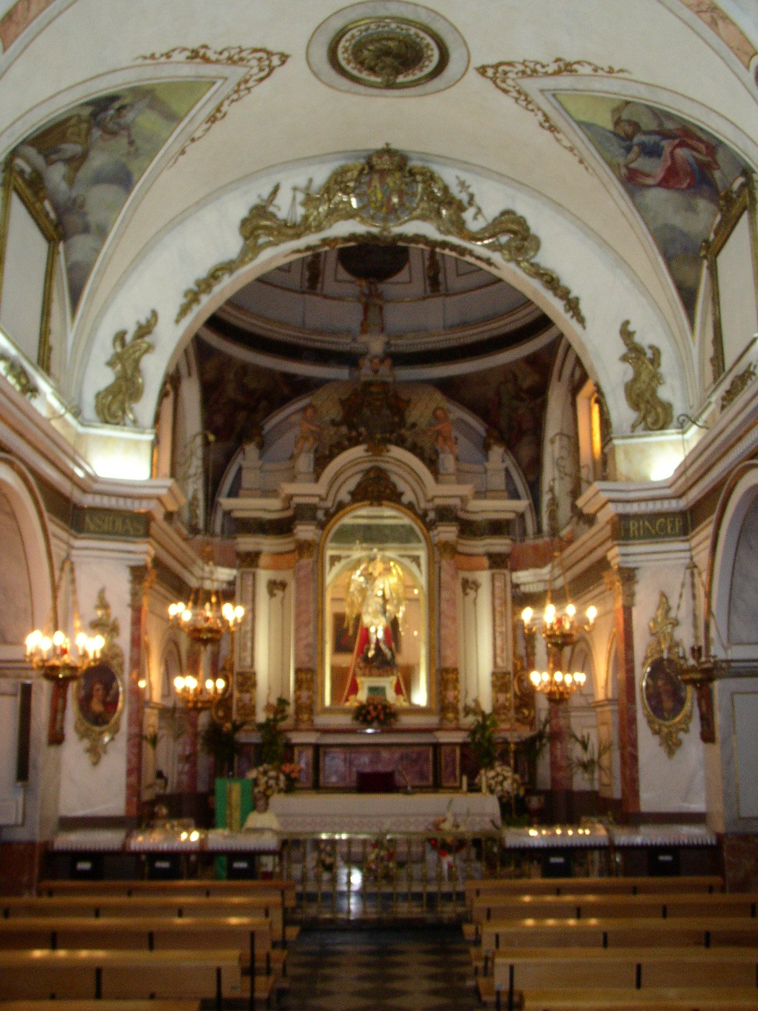 Valencia. (Comunidad Valenciana. España) Liria. Monasterio de San Miguel. Siglo XVIII (interior). Fotografía realizada el 24 septiembre de 2006 por el autor. User:Pelayo2